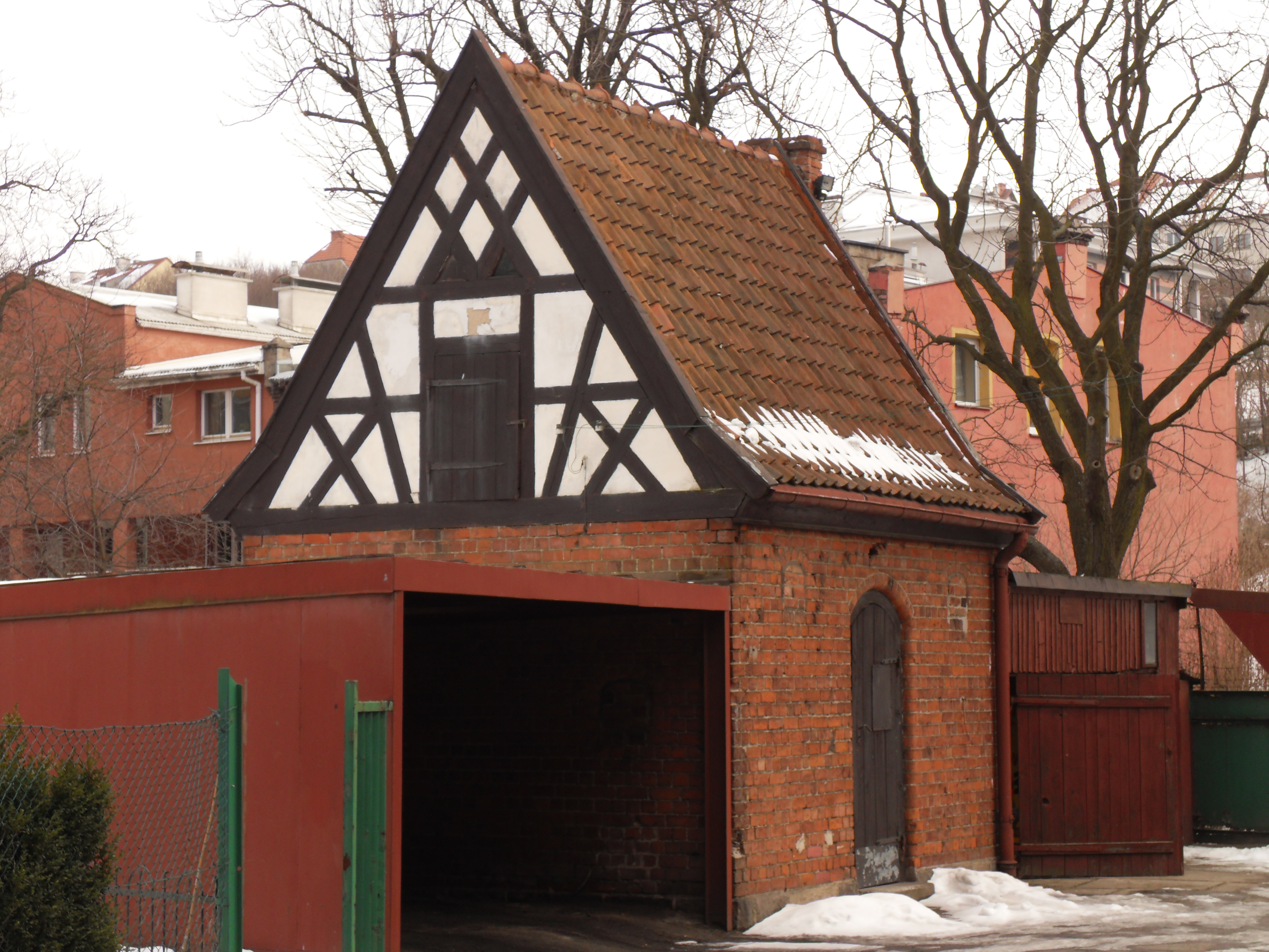 Zabytkowy budynek gospodarczy przy plebanii kościoła p.w. Św. Franciszka z Asyżu w Gdańsku Siedlcach.